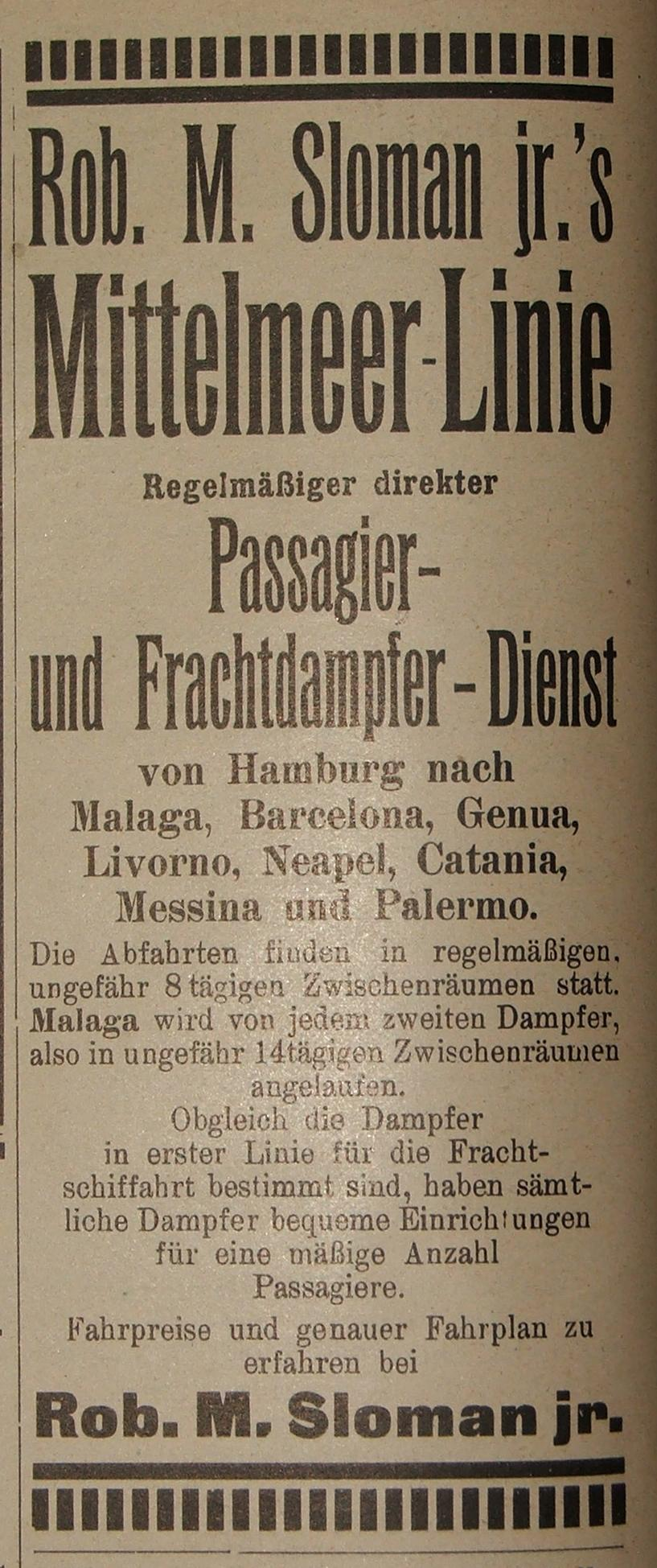 Werbeanzeige Rob. M. Sloman jr. in der Fachzeitschrift "Hansa" von 1913